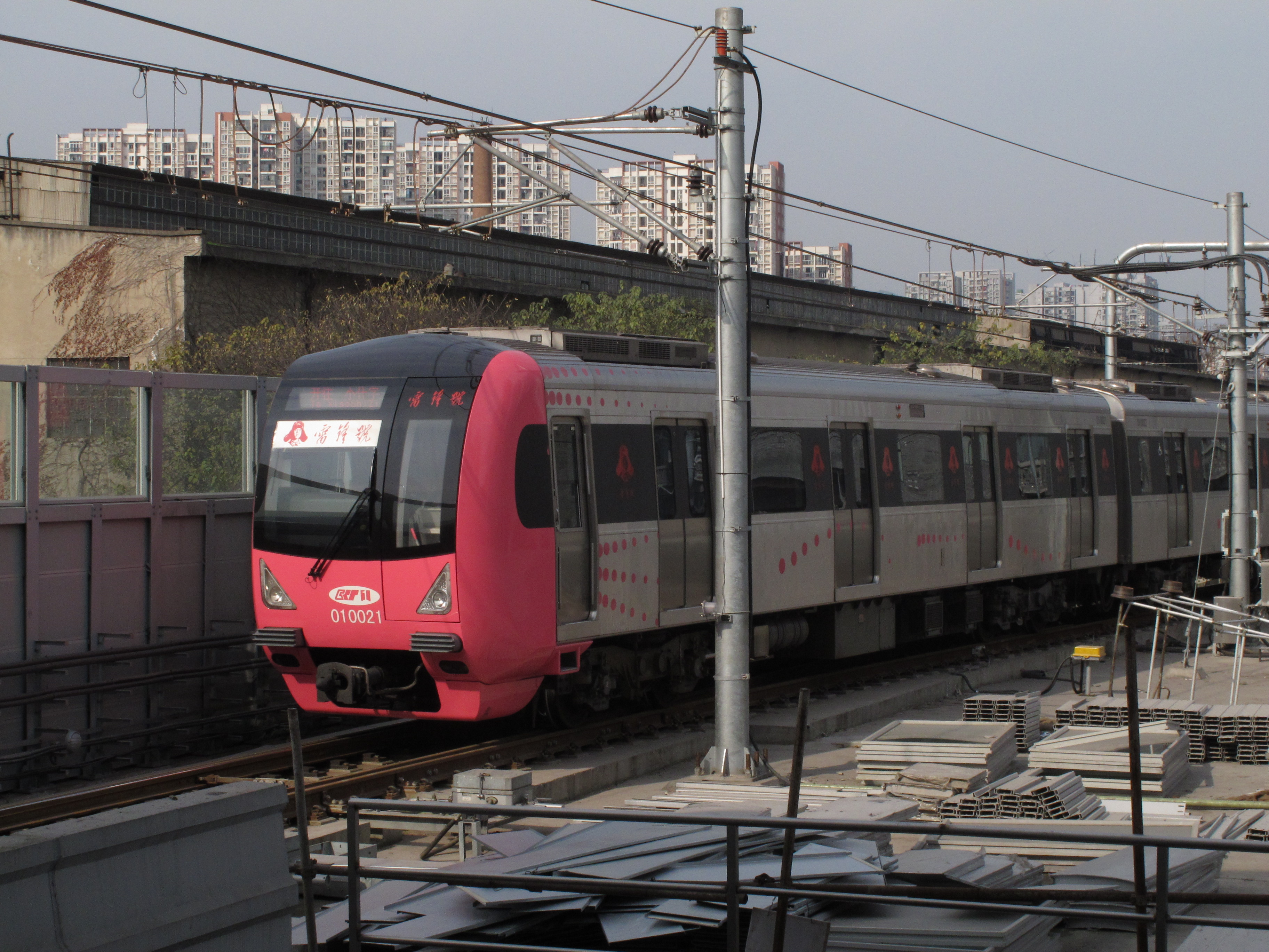 重庆轨道交通1号线双碑站是小交路的终点，车辆在站内调头